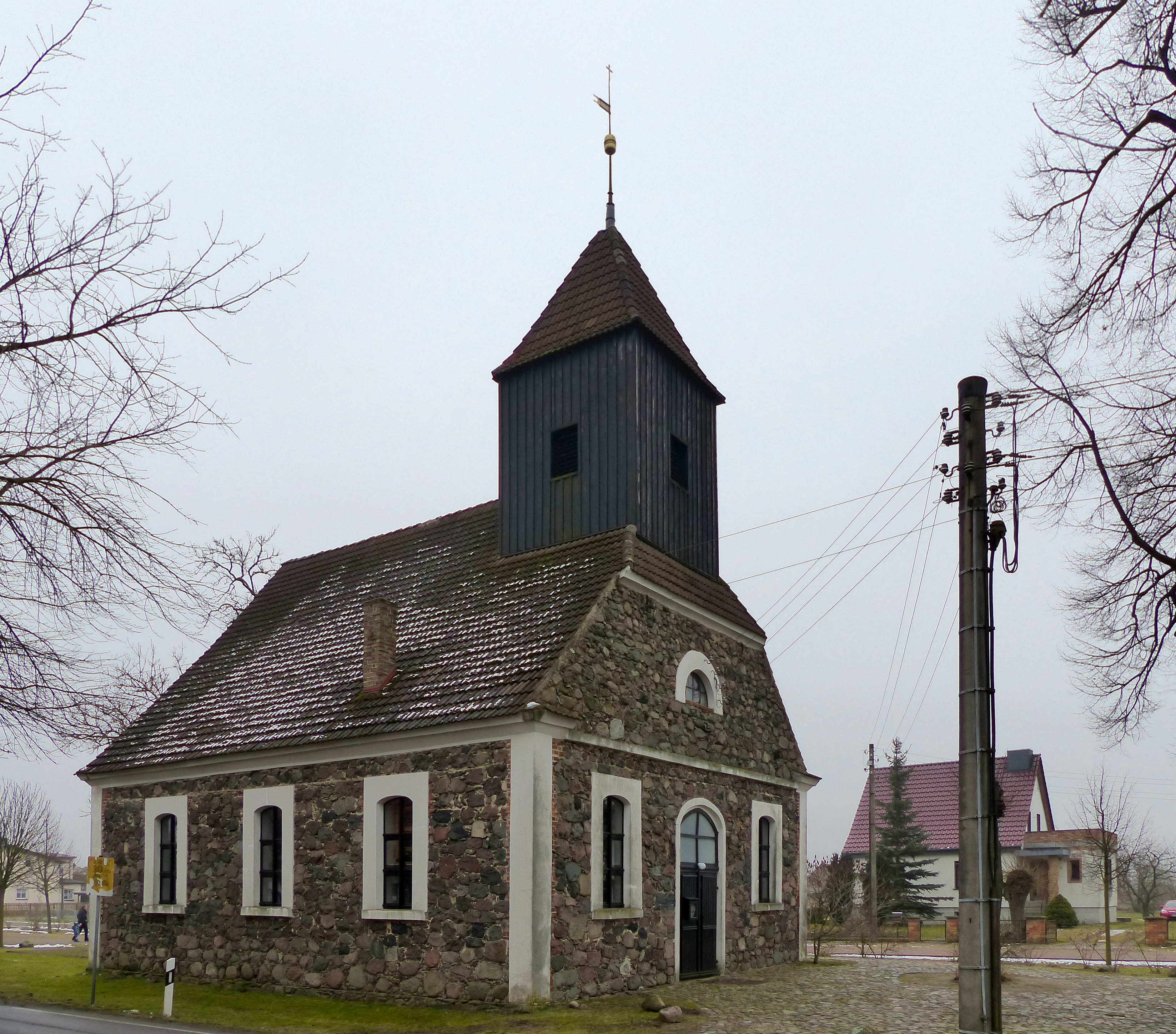 Kirche in Meiersberg, Ansicht von Nordwesten